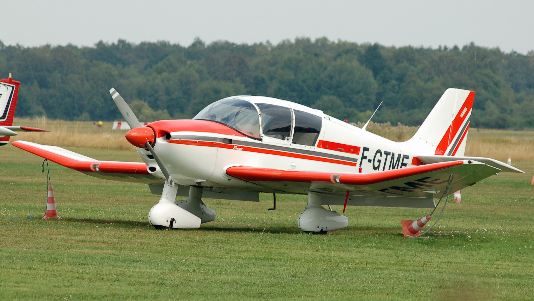 Robin DR 253 Régent (F-GTME) auf dem Flugplatz Uetersen